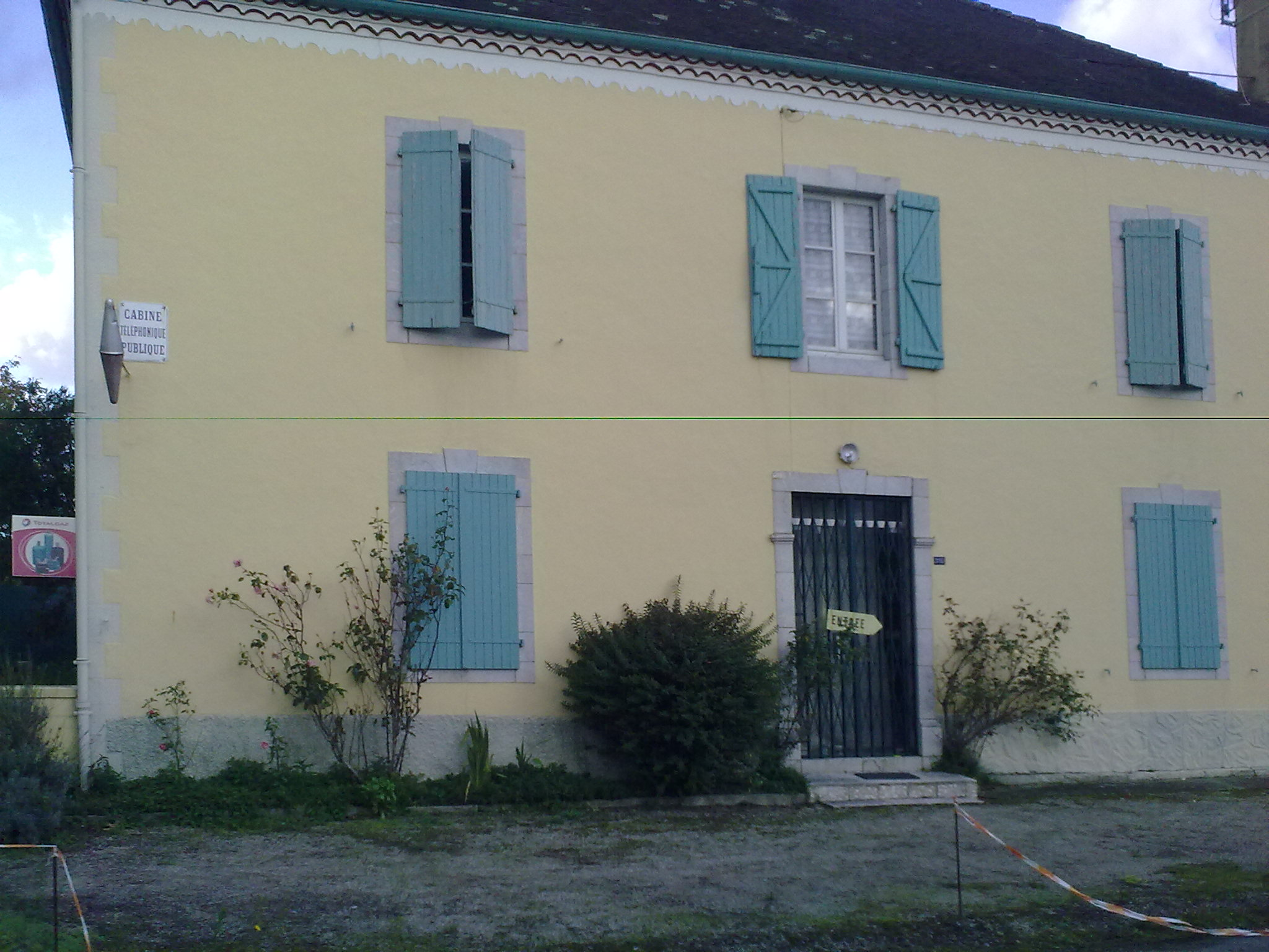 Hagetaubin